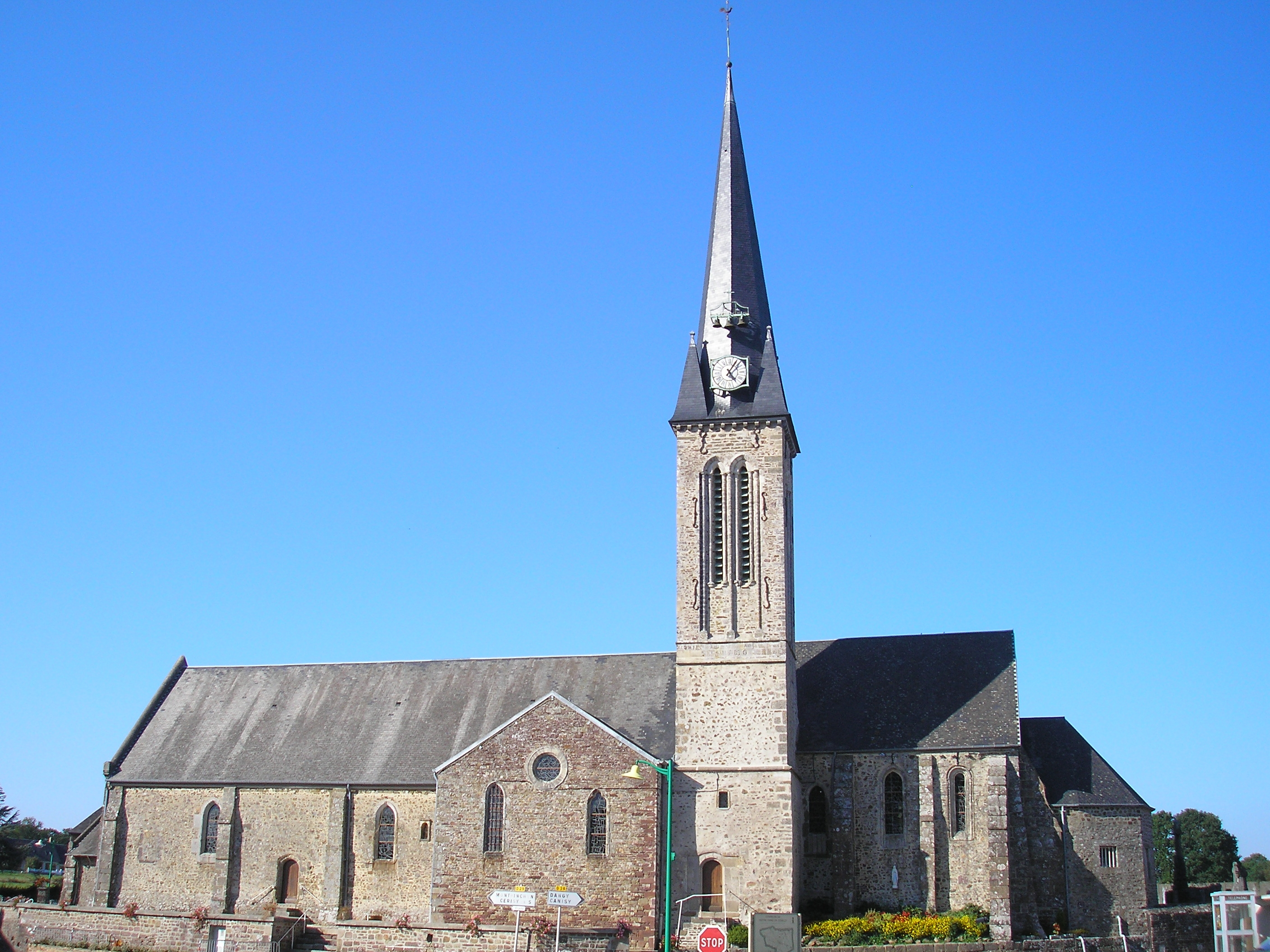 Notre-Dame-de-Cenilly (Normandie, France). L'église Notre-Dame.